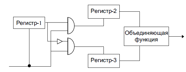 Чередующийся генератор "стоп-пошел"